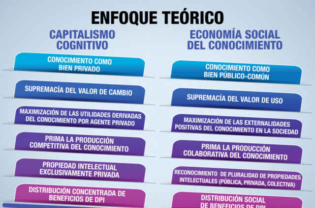 Esquema comparativo entre la teoría del Captialismo Cognitivo y la Economía Social del Conocimiento.